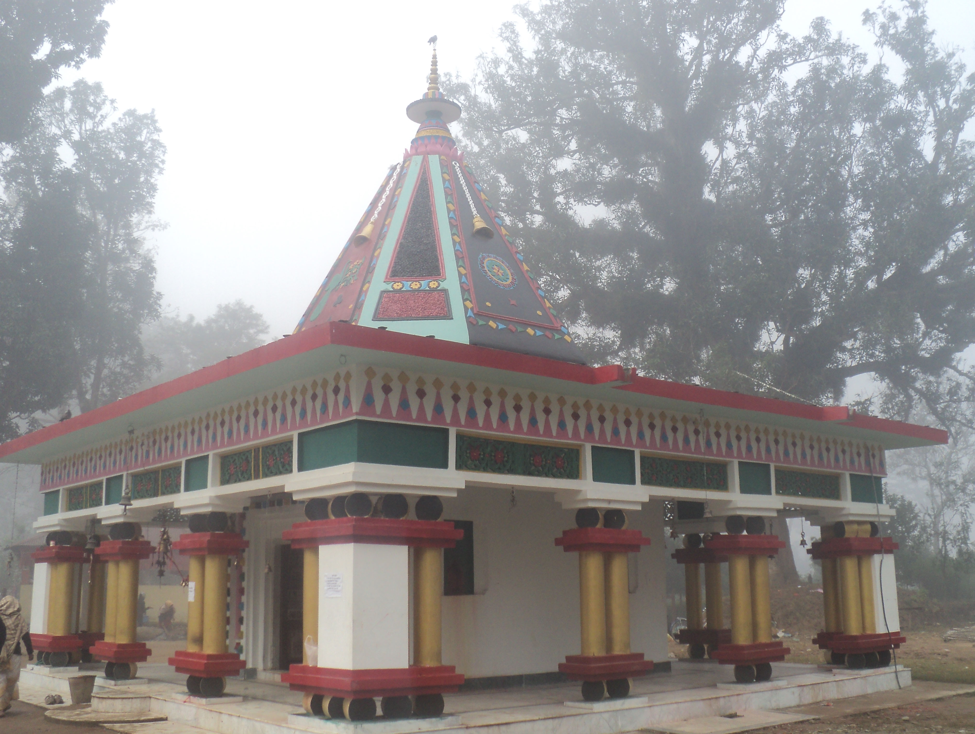 नेपाली: ठाकुरबाबाको मन्दिर